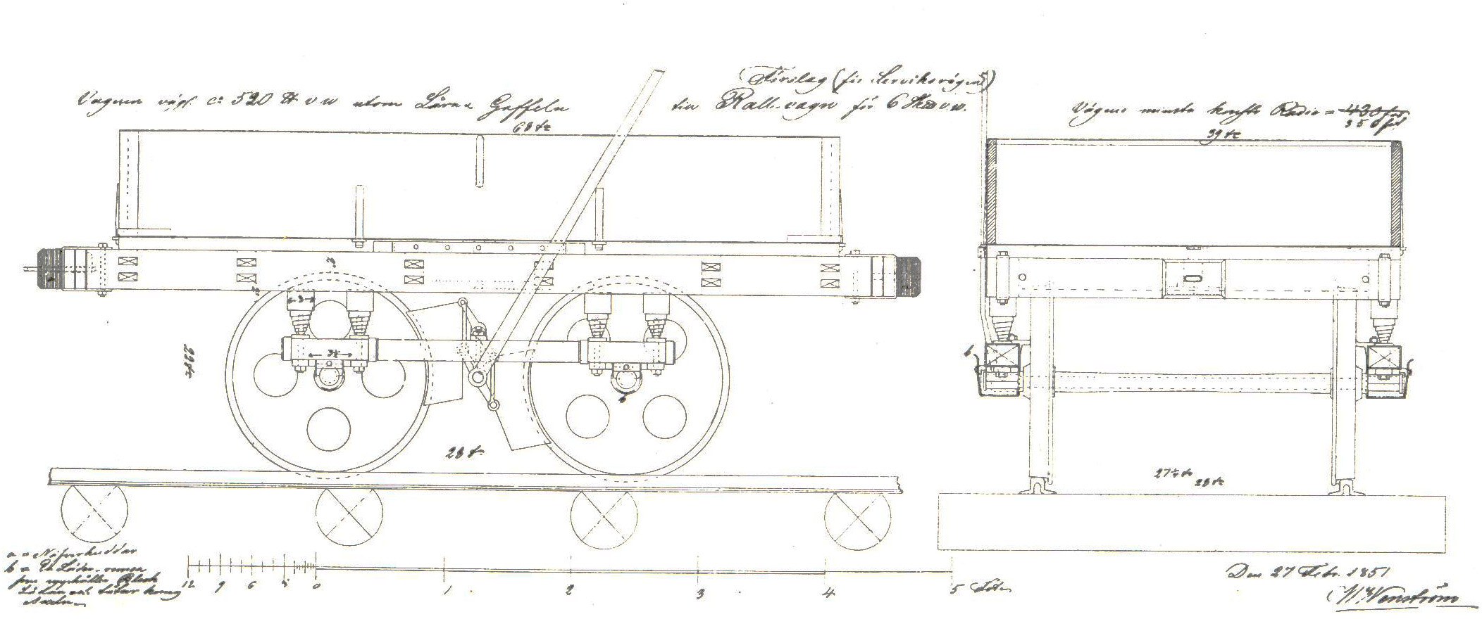 Rallvagn vid Lerviks Järnväg